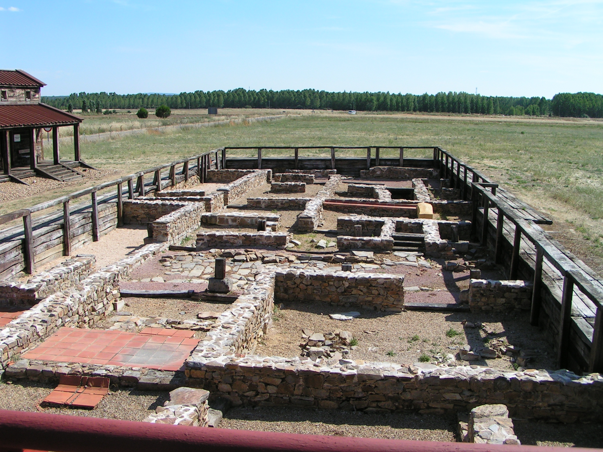 Excavación arqueológica de las ruinas romanas de Petavonium, también llamado Sansueña. RI-55-0000055